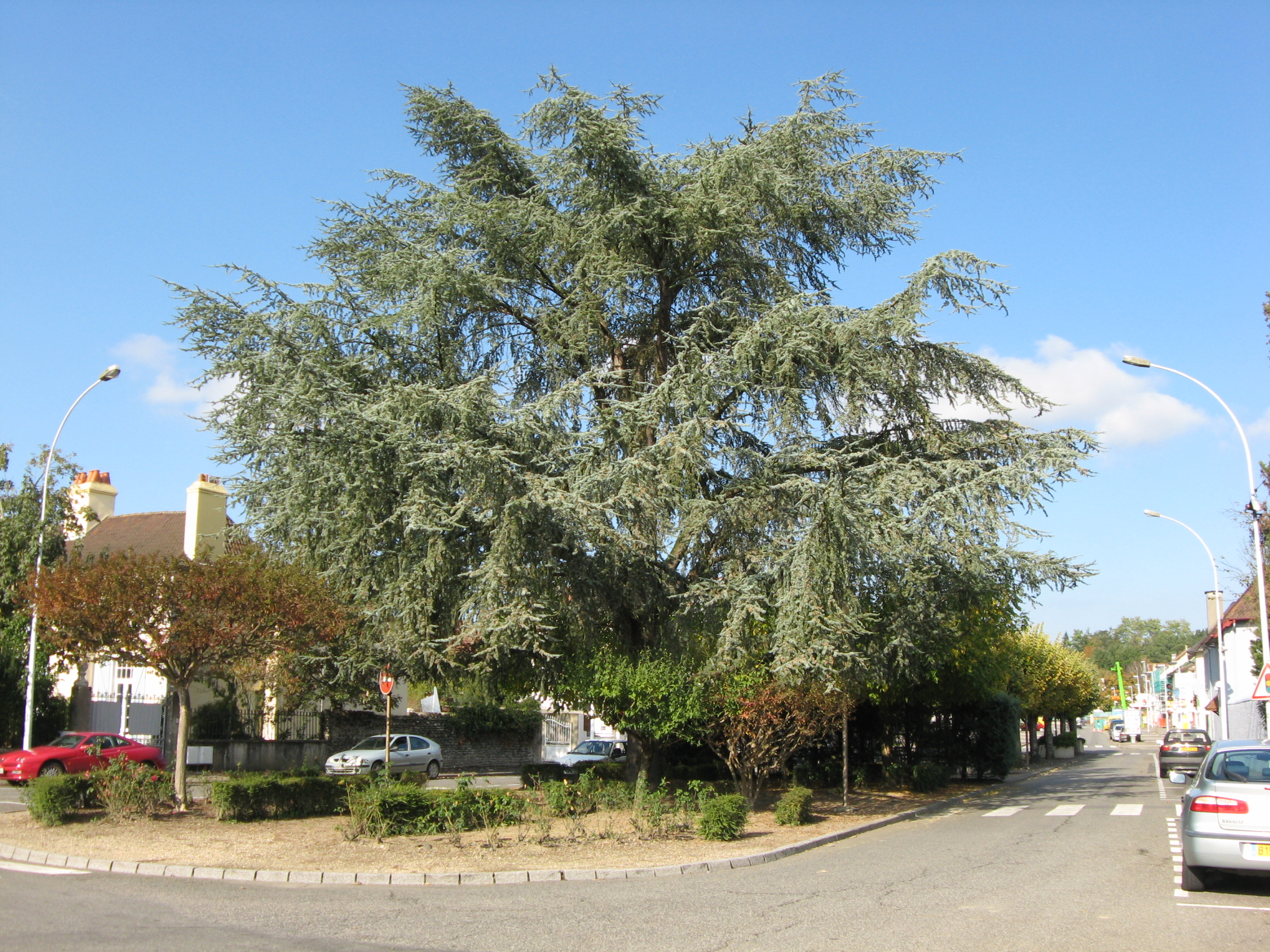 Vue d'une rue d'Artix et son terre-plein verdoyant (Pyrénées Atlantiques) Pyrénées).